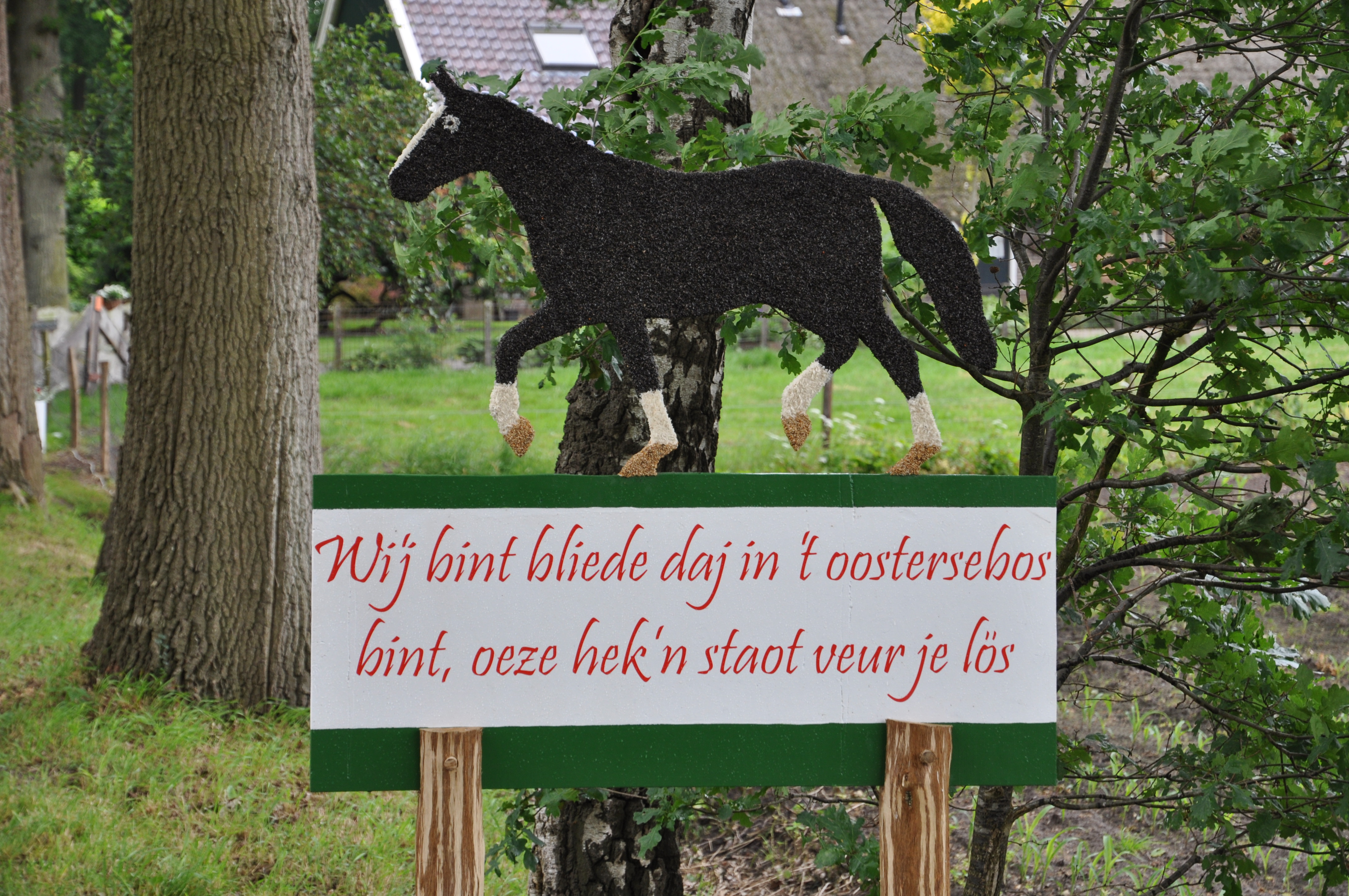 Straatversiering tijdens Zuidenveld Schoonebeek 2012.